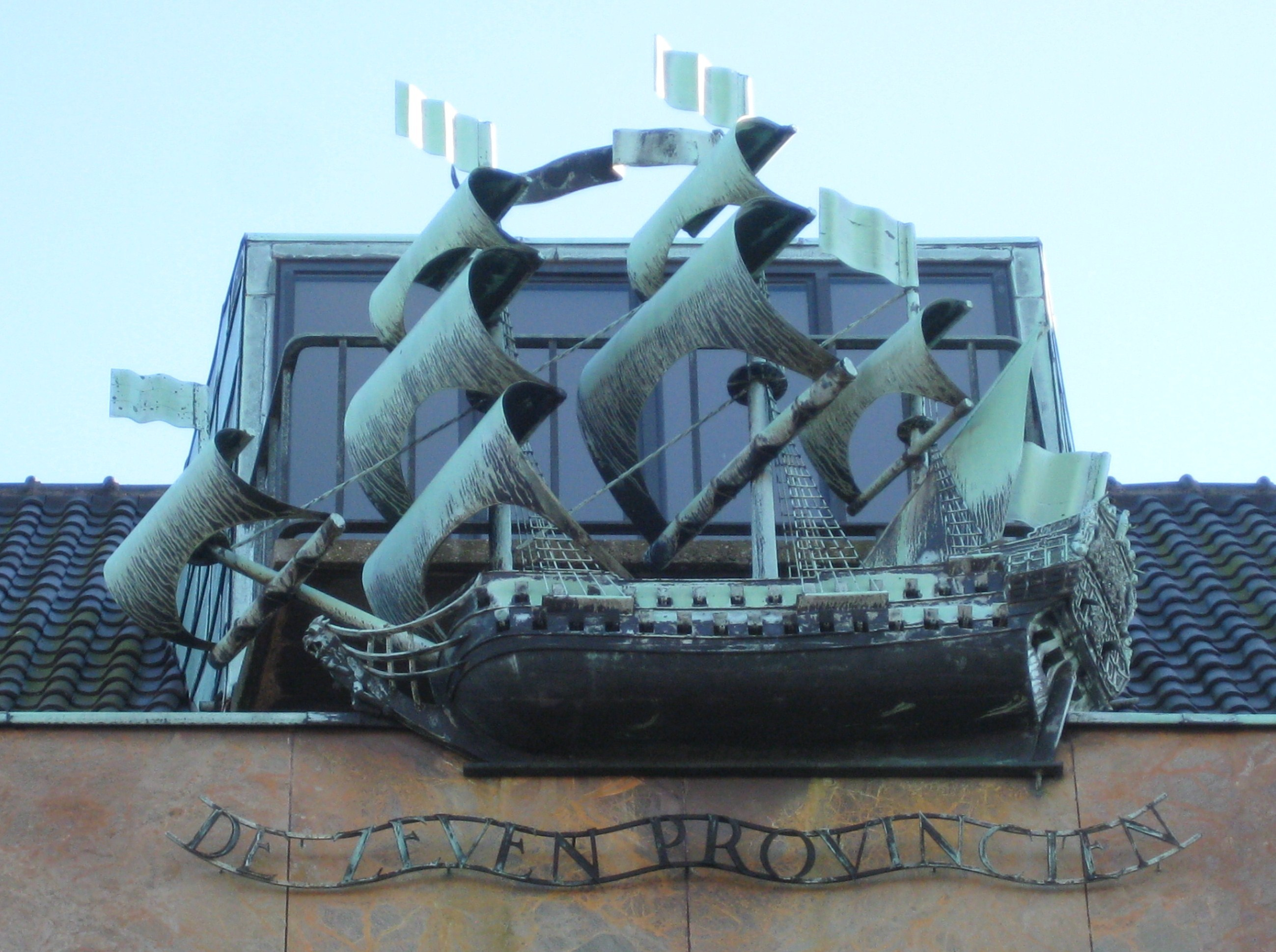 Gevelbeeld aan de Lange Voorhout 3, Den Haag. Koperen replica van De Zeven Provinciën. 1960